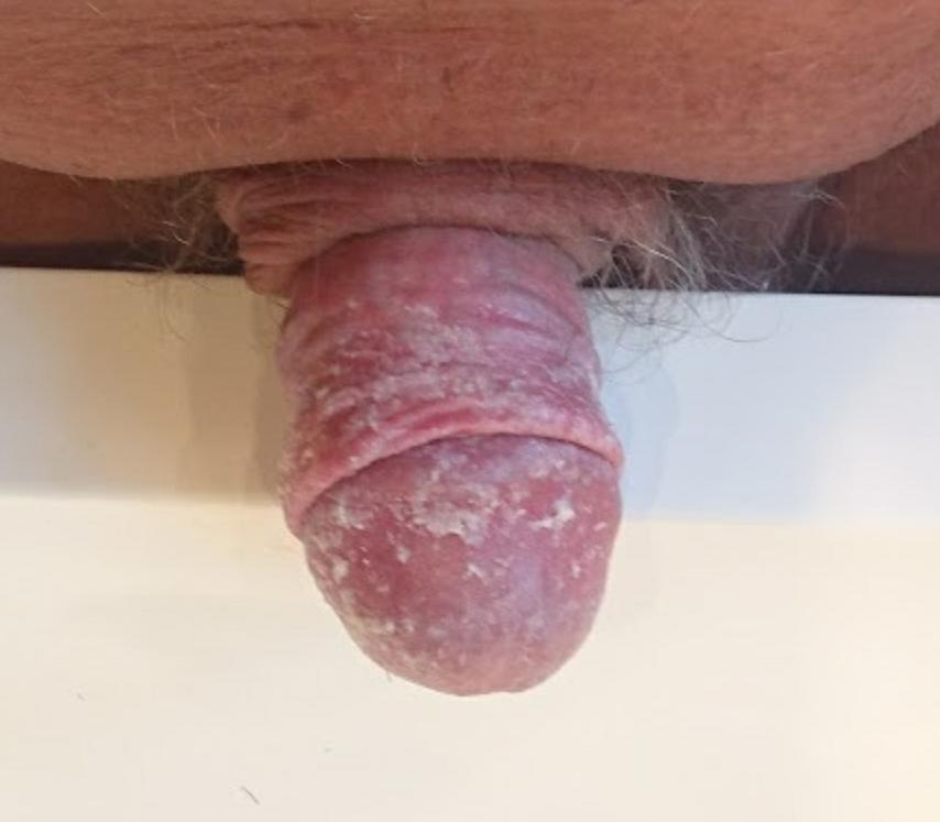 Gland et prépuce objet d'une balanite de Noon avant toilette.